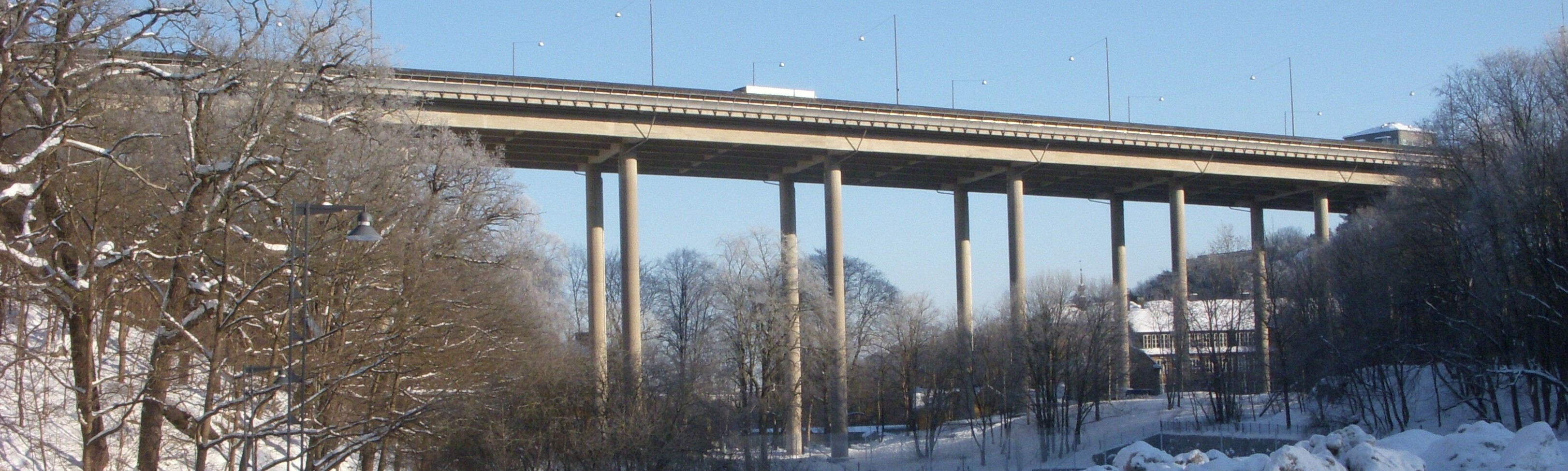 Blommensbergsviadukten i Stockholm